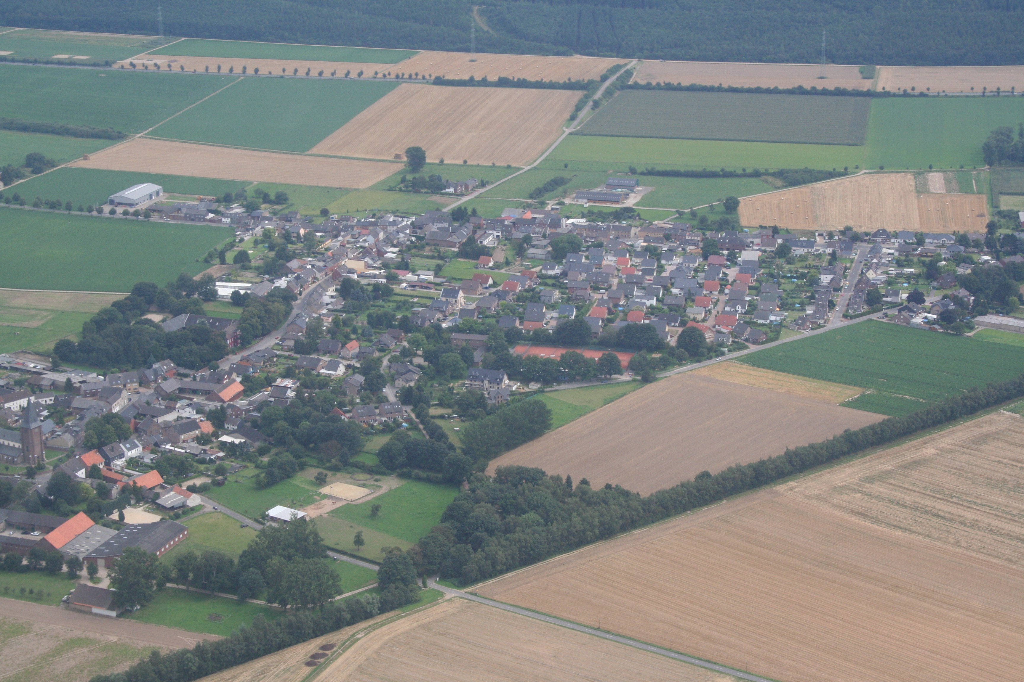 Güsten NRW von Norwesten aus